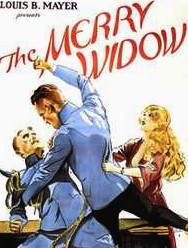 Постер фильма Эриха фон Штрогейма «Весёлая вдова»